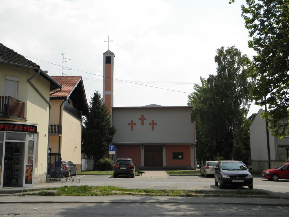 Župna Crkva Rođenja Blažene Djevice Marije, Višnjevac. Svibanj, 2011.